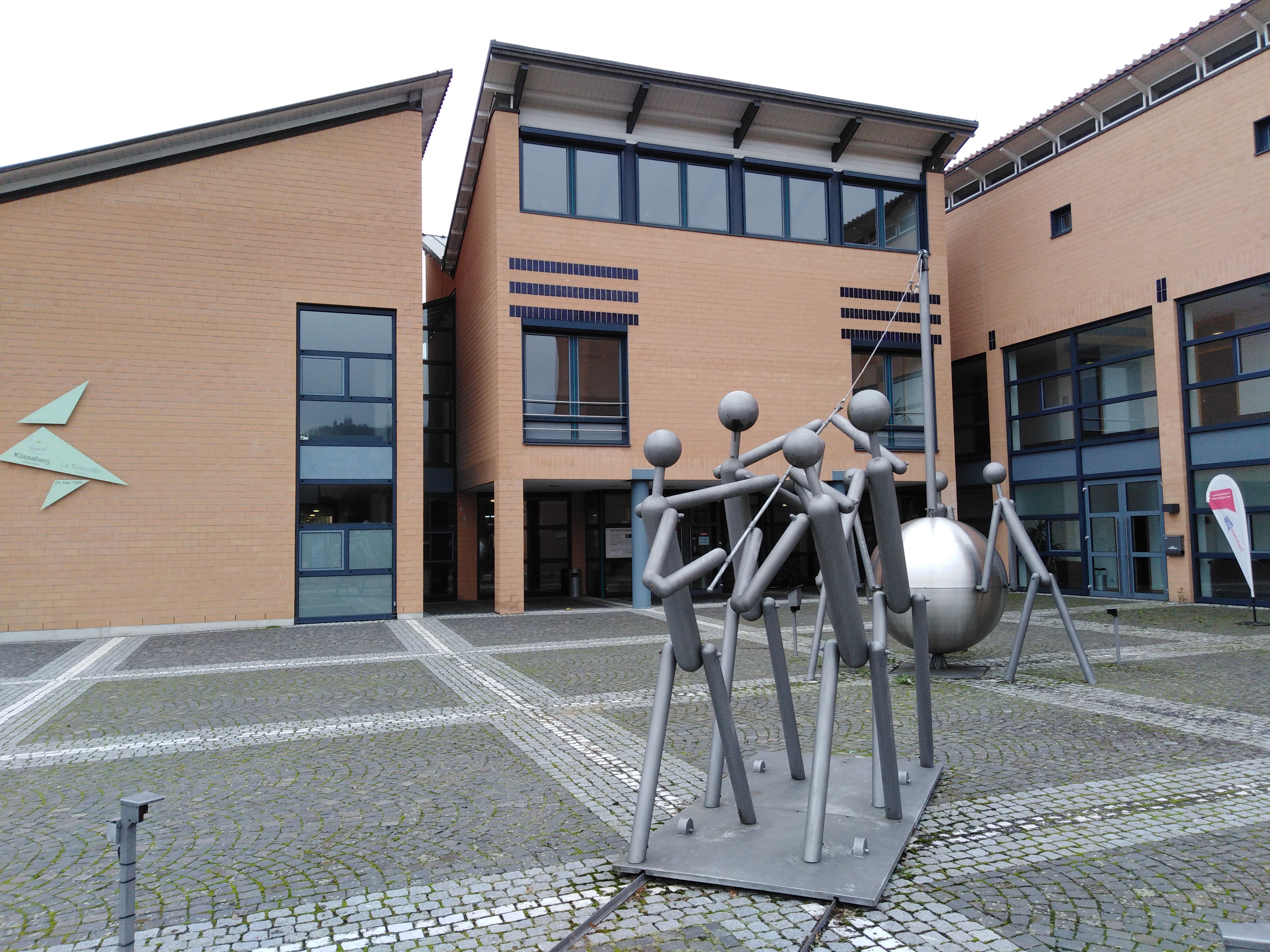 Rathaus der Gemeinde Küssaberg im Landkreis Waldshut in Baden-Württemberg. Standort im Ortsteil Rheinheim.